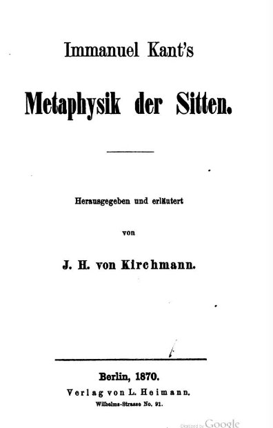 Immanuel Kant, Metaphysik der sitten , Berlin, L. Heimann, 1870.